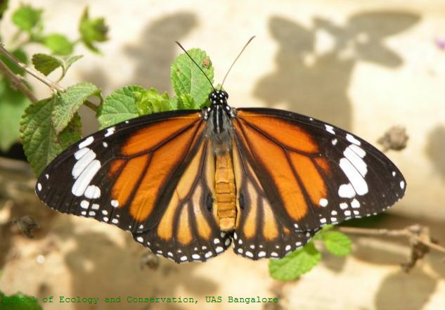 Danaus genutia adult, India